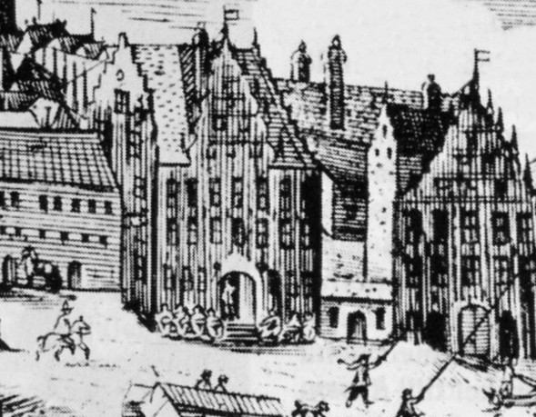 Hans Marschalcks hus på ett kopparstick av Wolfgang Hartmann